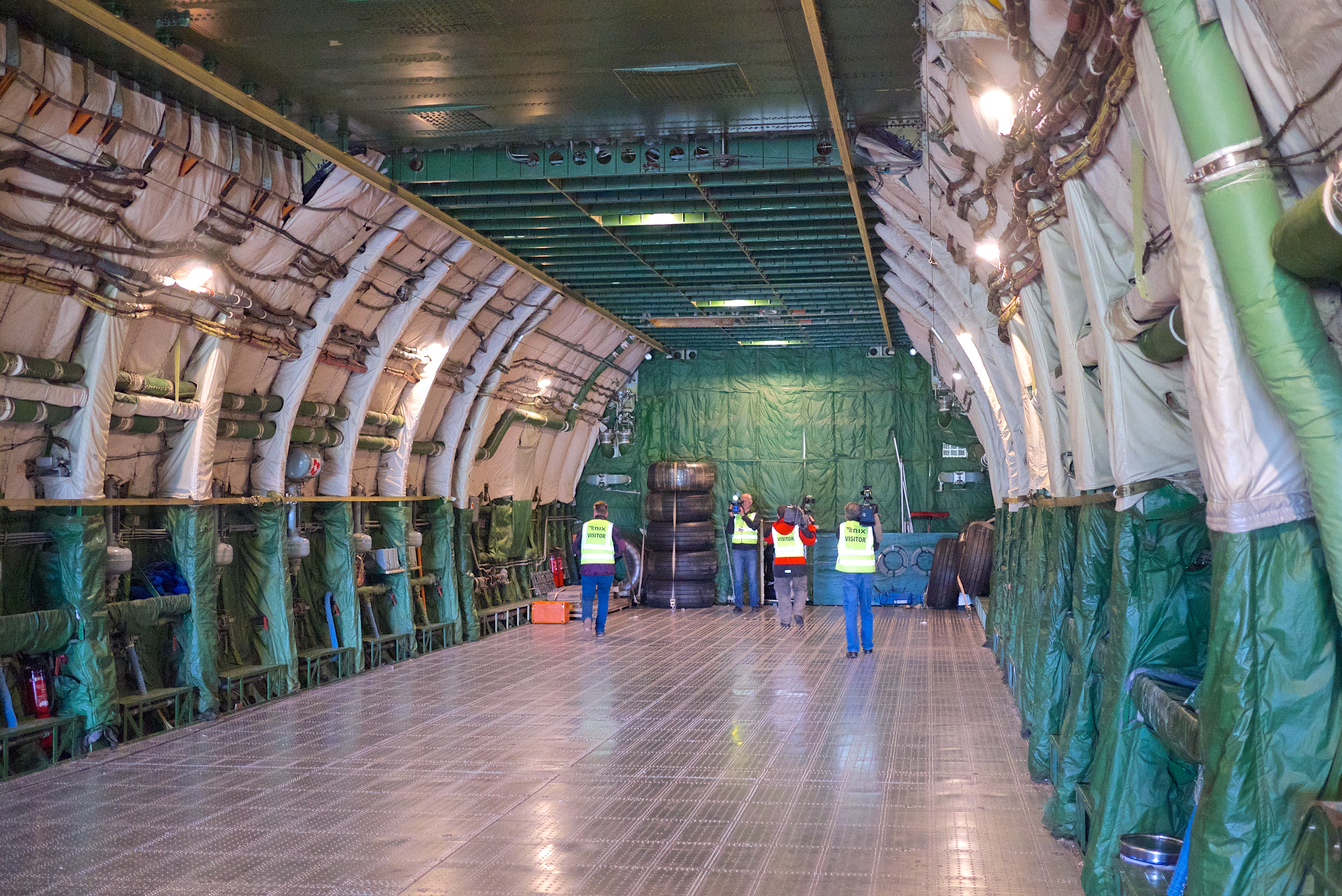 Antonov An-225 Mriya